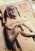 Foto der Grabstätte von Margarete Ebner Sonstiges: die website gibt an, dass das Bild gemeinfrei ist.